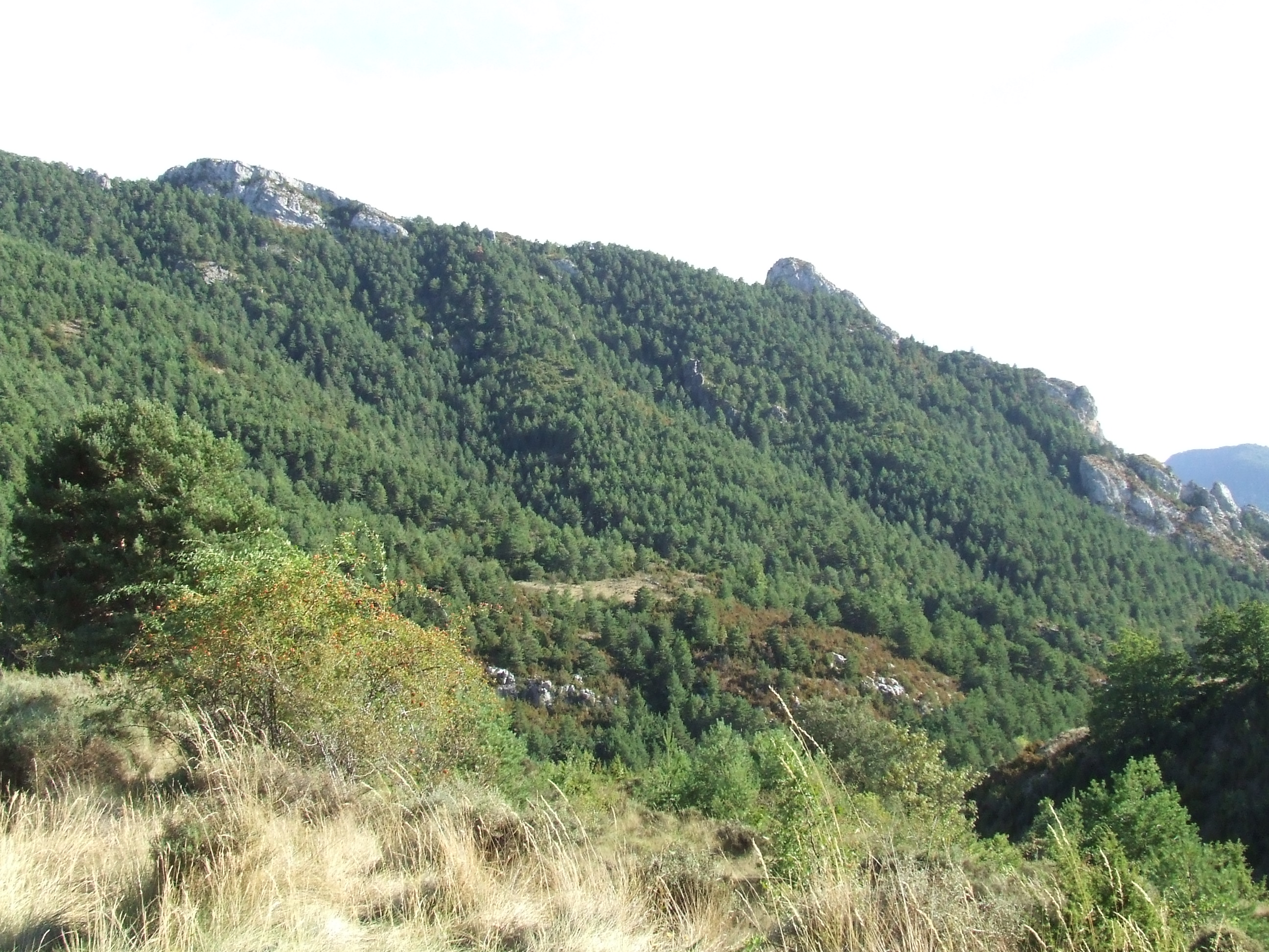 L'Obac del Pi Gros (Bóixols, Abella de la Conca, Pallars Jussà)